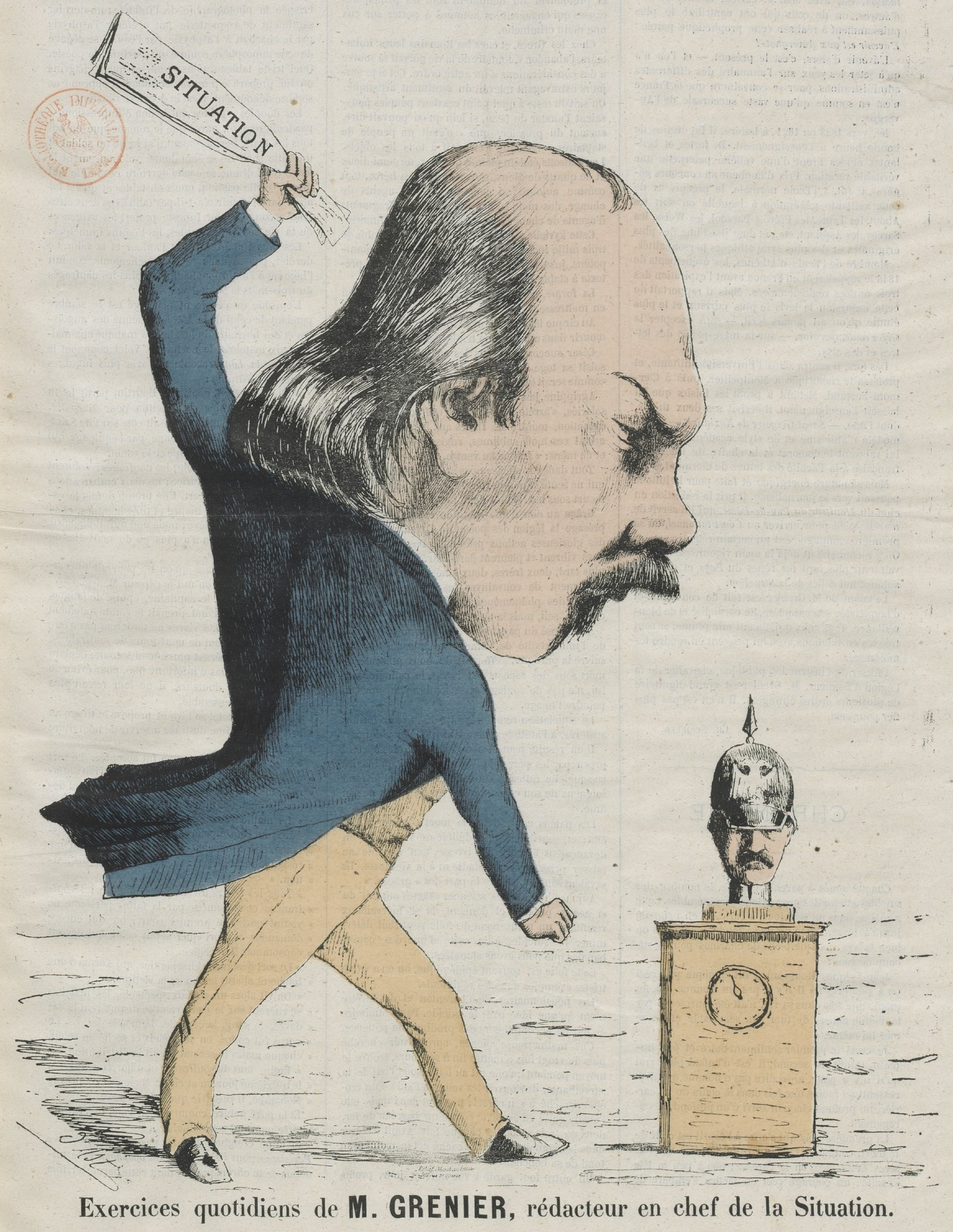 "Exercices quotidiens de M. Grenier, rédacteur en chef de la Situation".